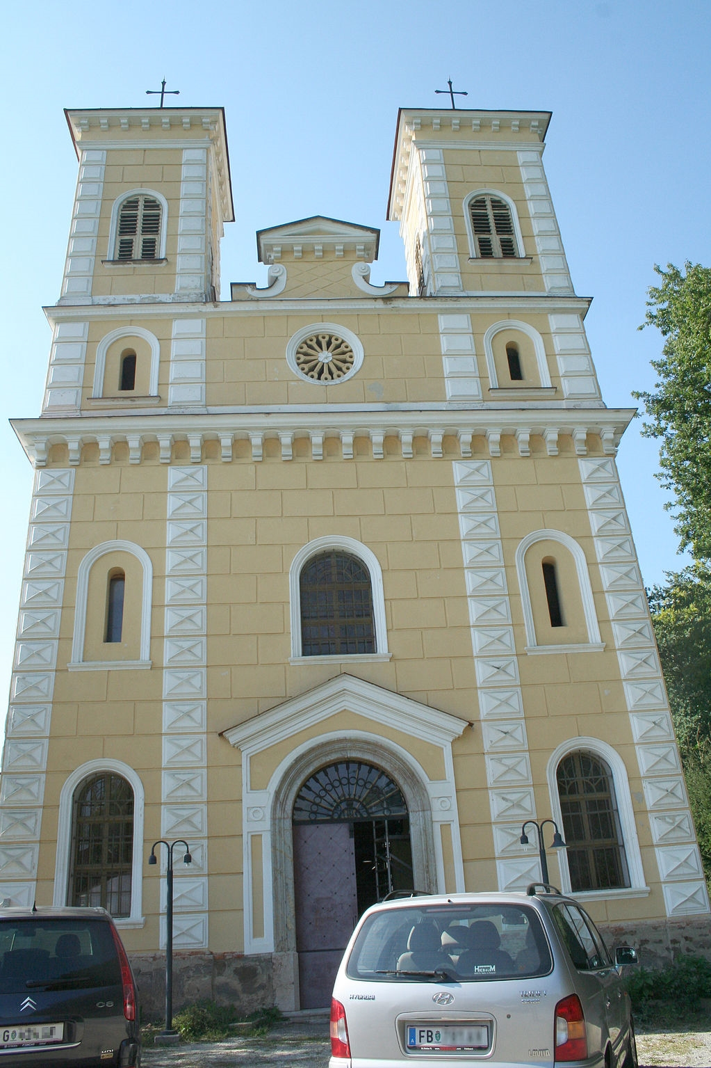 Kalvarienbergkirche Zum gegeißelten Heiland